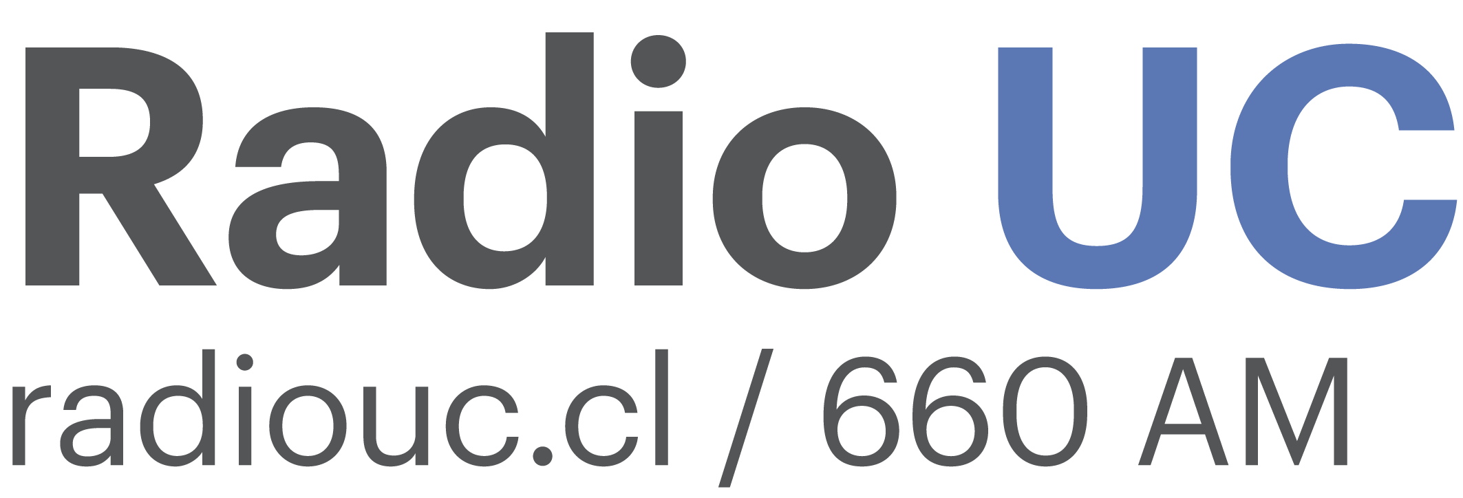 Radio UC Ideas que suenan bien